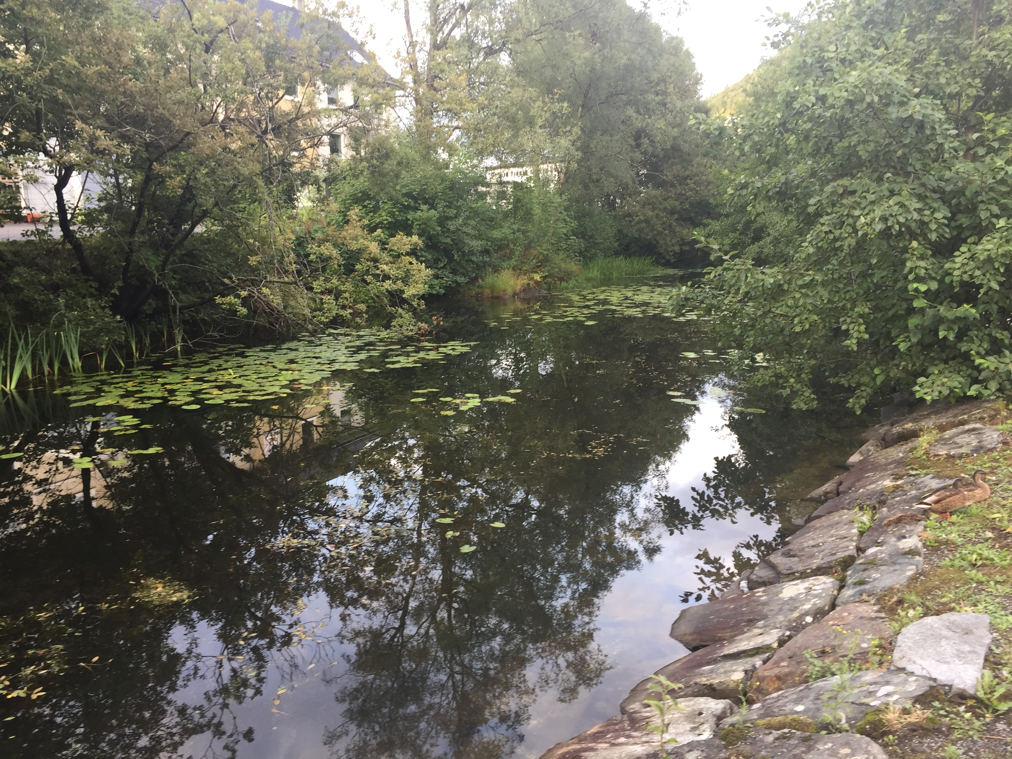 Parti av kanalen mellom Solheimsvatnet og Nordåsvannet